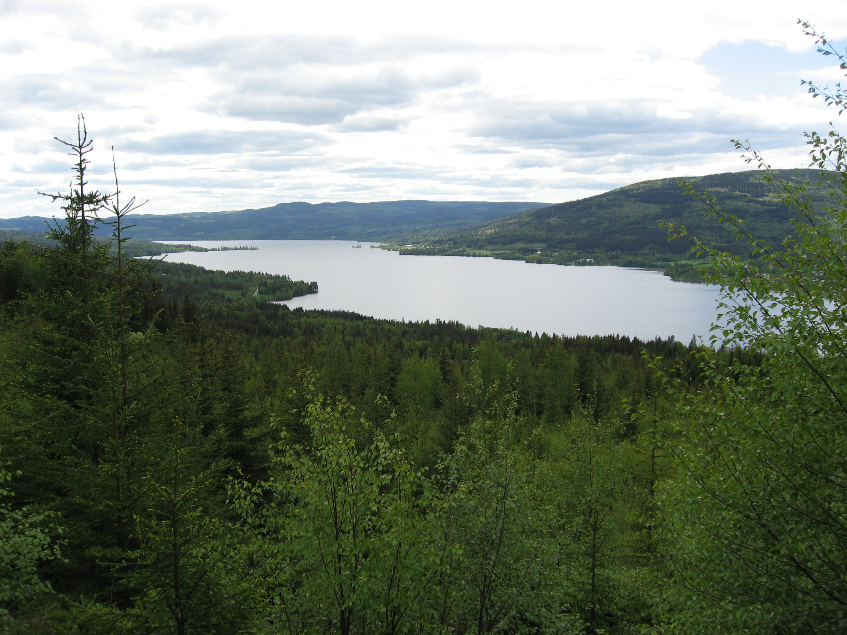 Hurdalssjøen (Hurdal lake) in Akershus, Norway